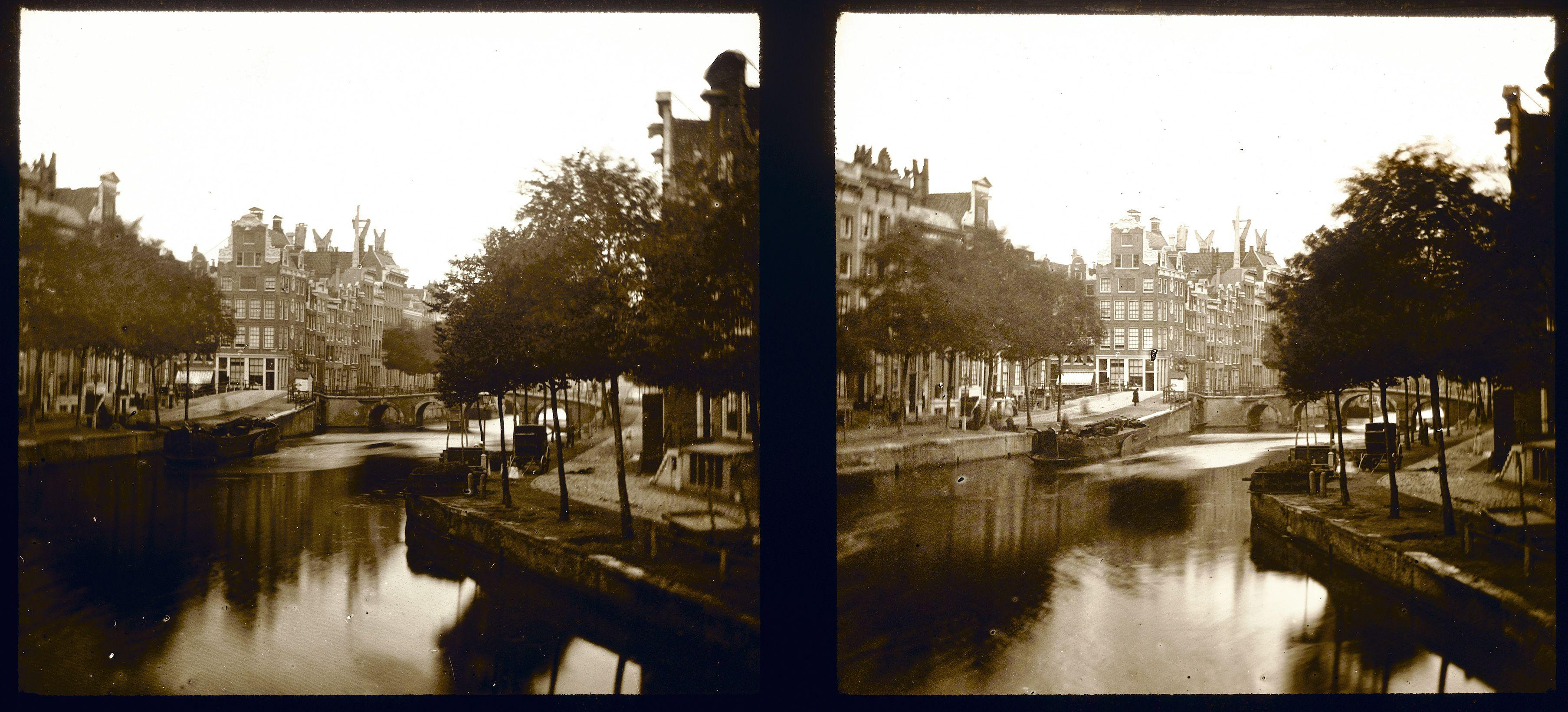 Beschrijving Herengracht Gezien in noordelijke richting, naar de Leliegracht. Stereoglasdiapositief. Documenttype foto Vervaardiger Oosterhuis, Pieter Collectie Collectie Stadsarchief Amsterdam: stereofoto's Datering 1856 t/m 1858 Geografische naam Leliegracht Herengracht Inventarissen Afbeeldingsbestand 010003025276 Generated with Dememorixer